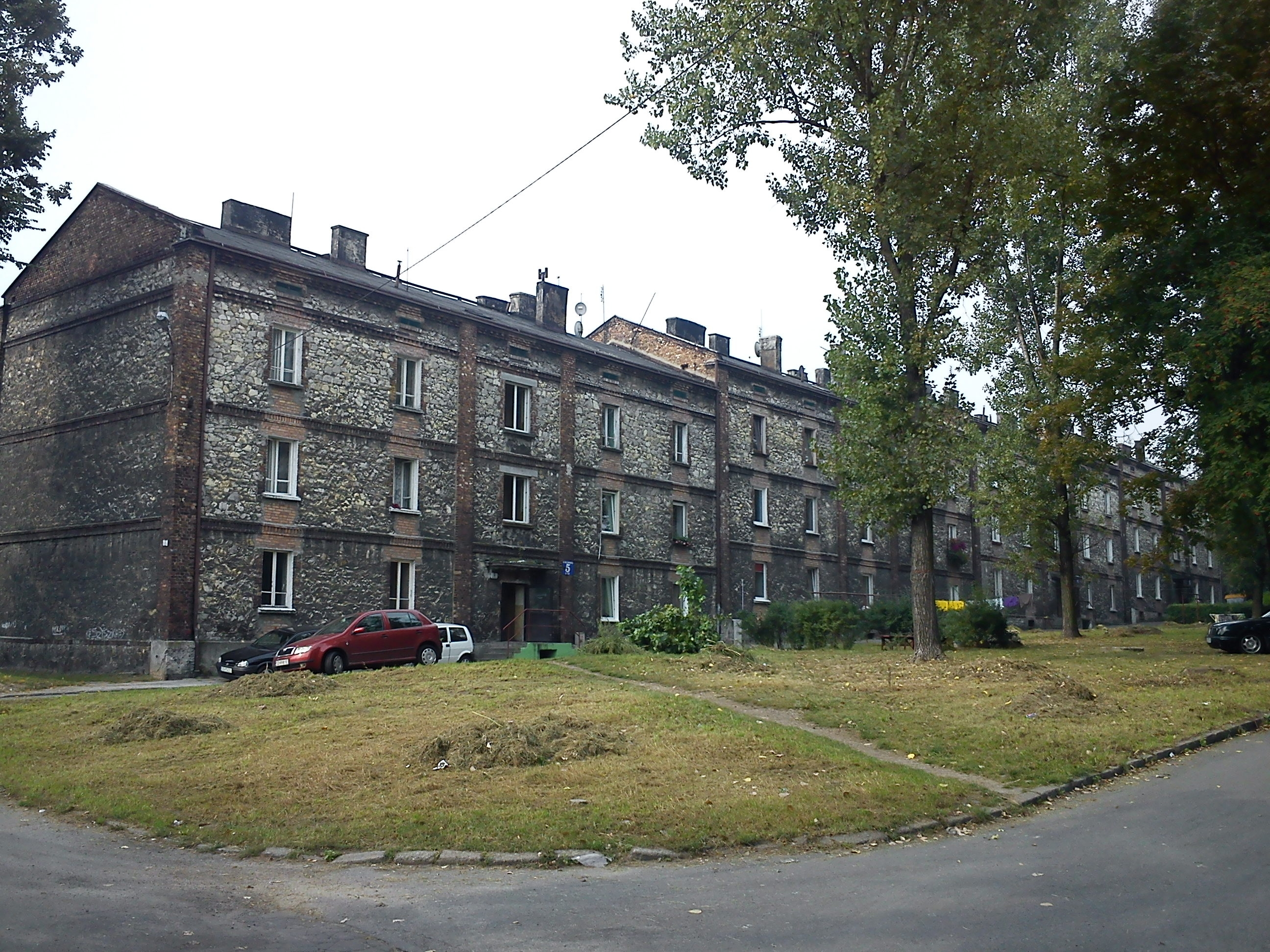 Sosnowiec-Klimontów.Ulica Kraszewskiego.